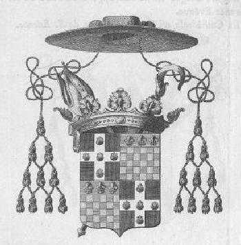 Armes de Charles-François de Rouvroy de Saint Simon, évêque d'Adge